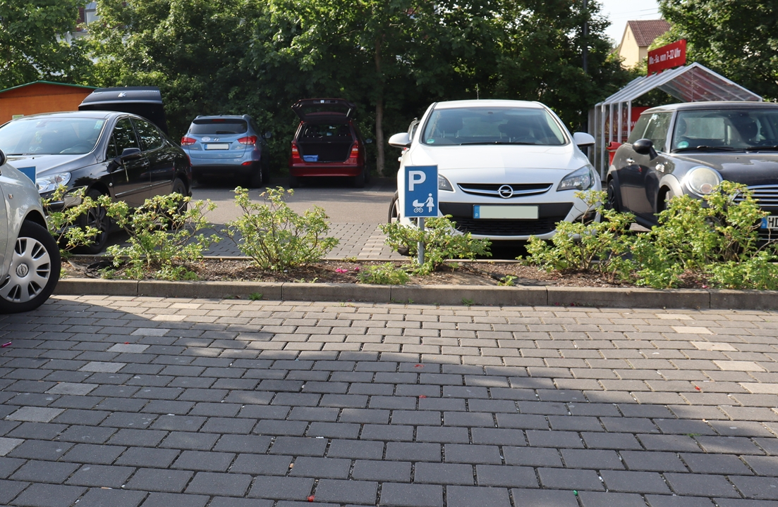 Hinweisschild für Mutter-Kind-Parkplatz